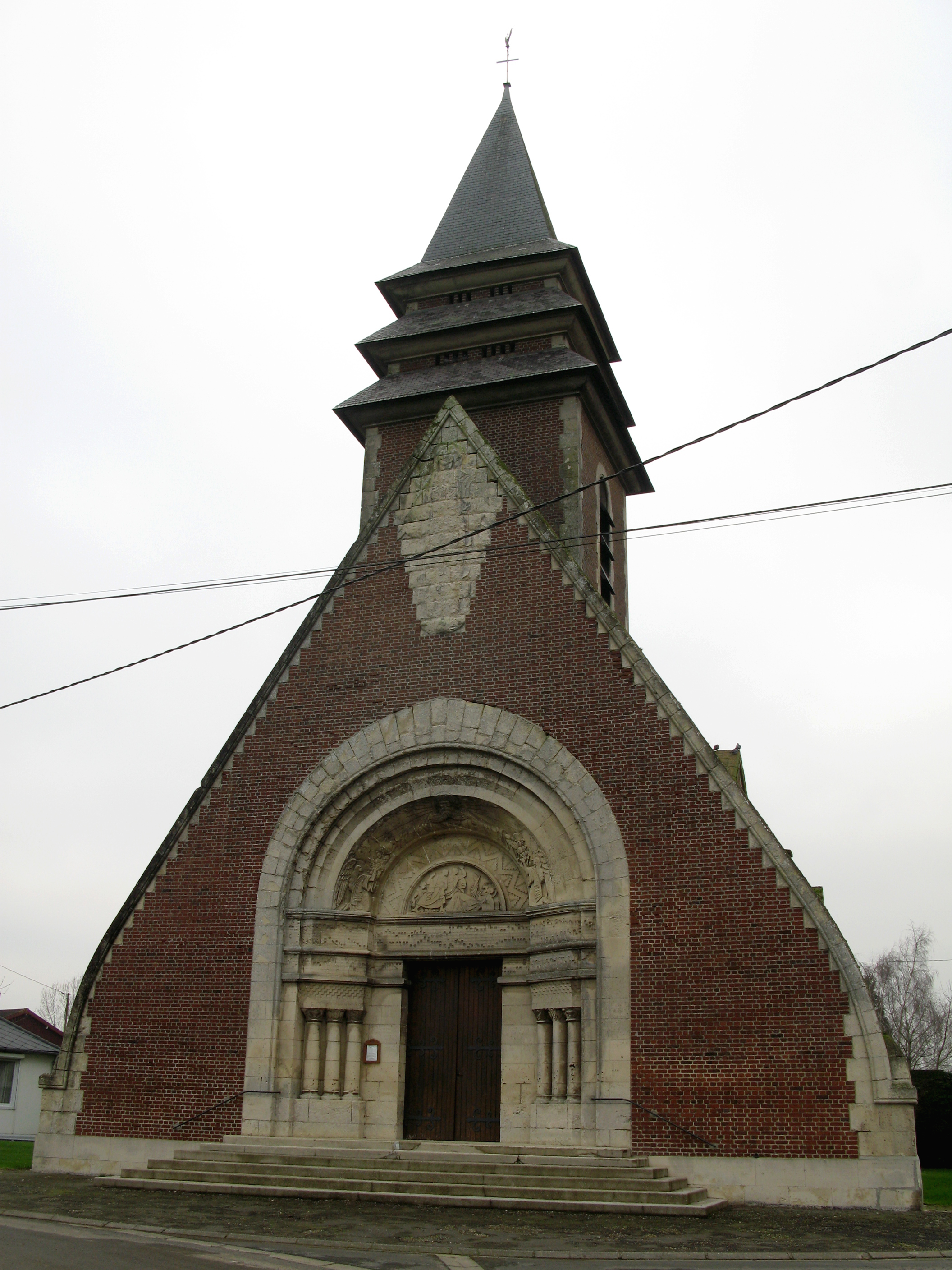 Mesnil-en-Arrouaise (Somme, France) - L'église. .